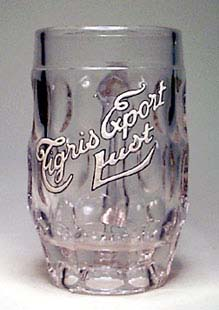 Bierpot Brouwerij Lust - Kortrijk - West-Vlaanderen - België